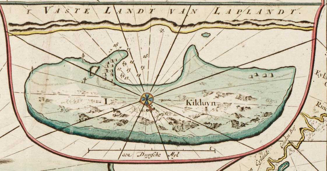 Карта Кильдина "Van Keulen Atlas", (Witte Zee).